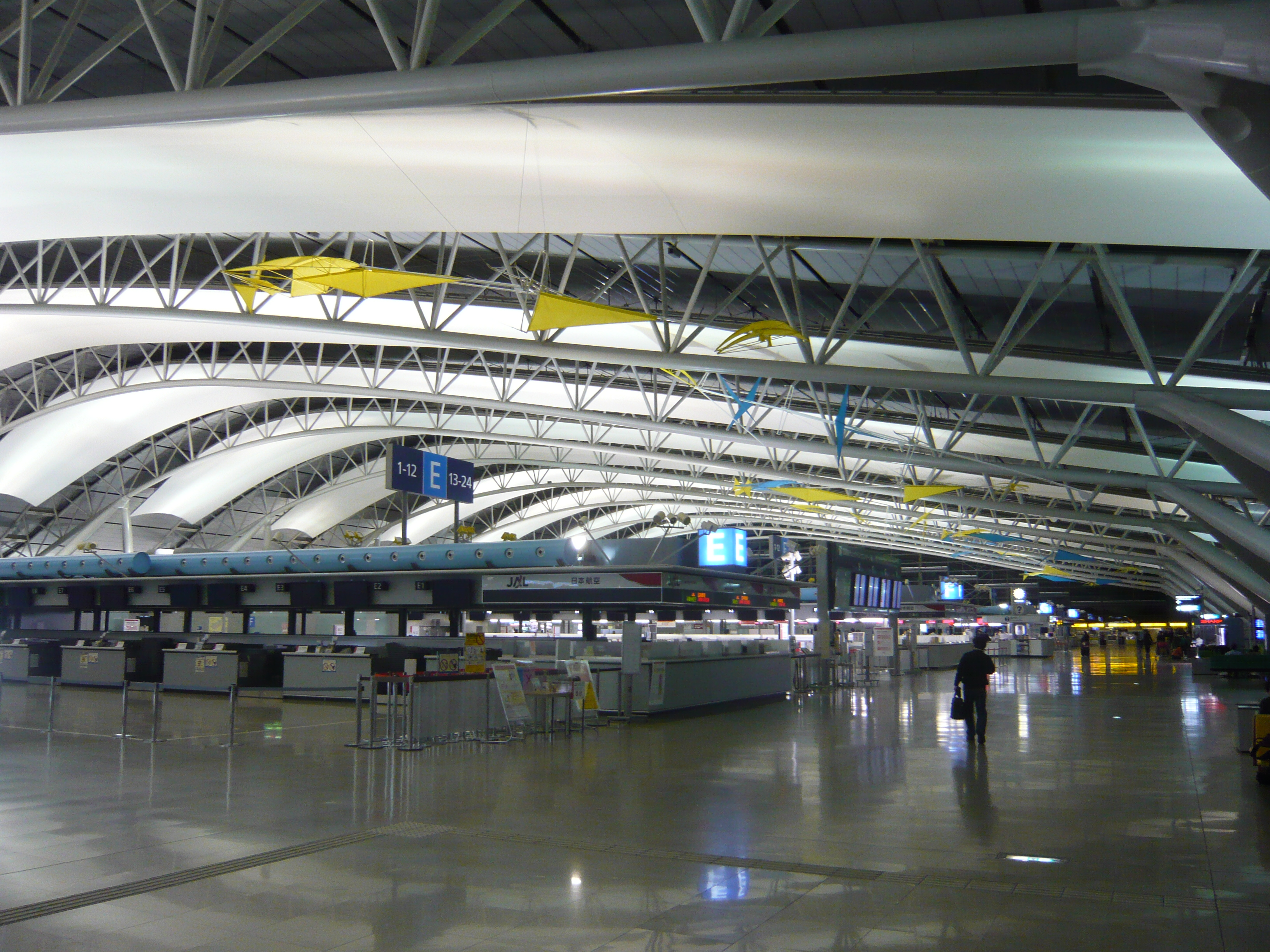 Kansai International Airport（関西国際空港）,Osaka,Japan（大阪府）で撮影。